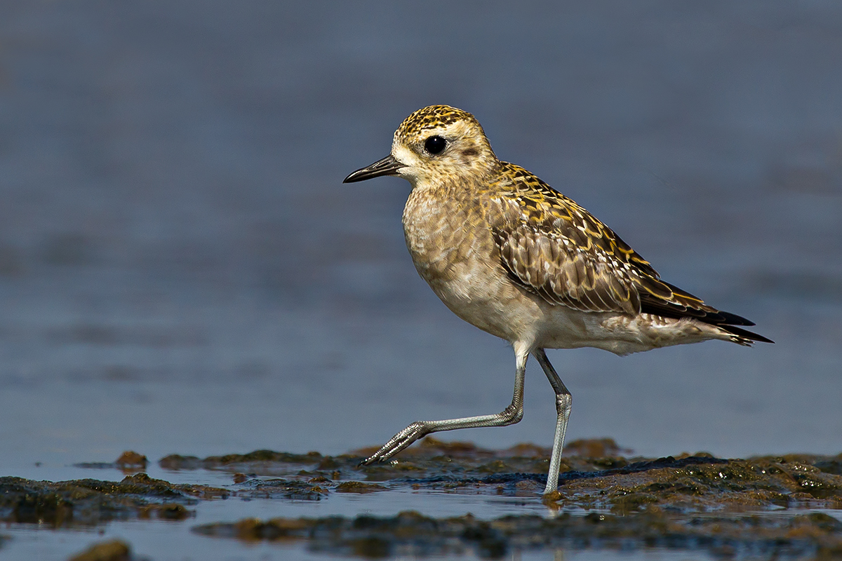 Shoalhaven Heads